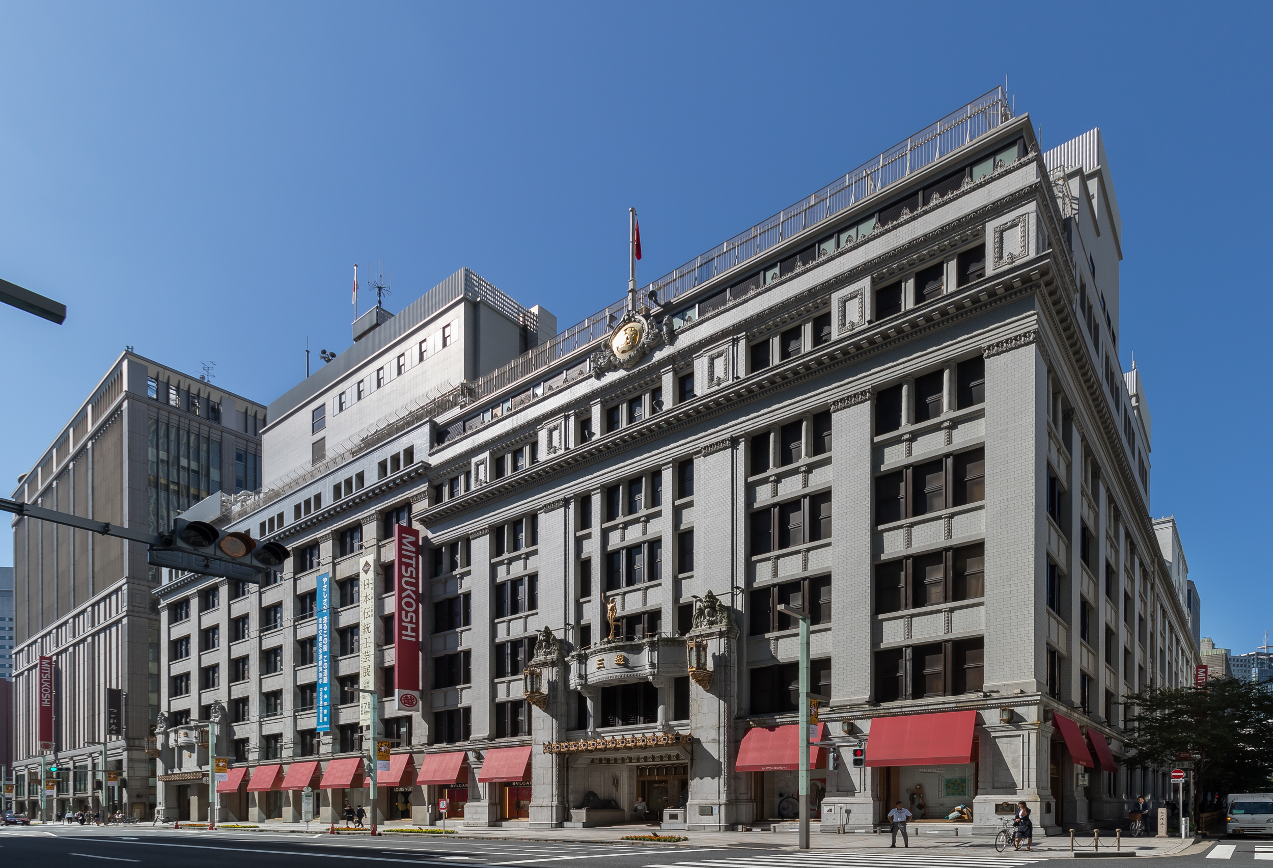 三越日本橋本店本館（重要文化財）。横河工務所設計（1914年）。